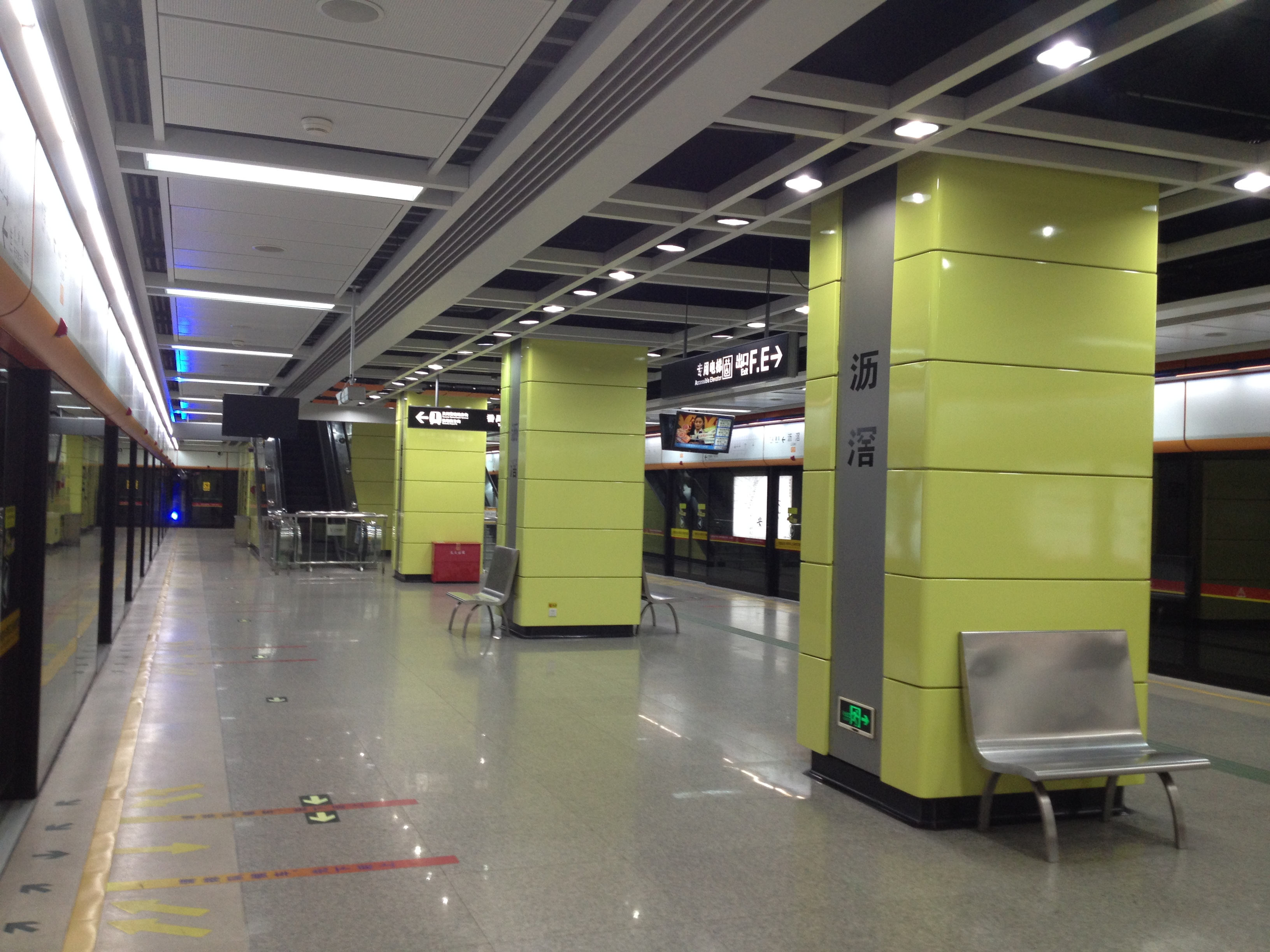 广州地铁沥滘站月台